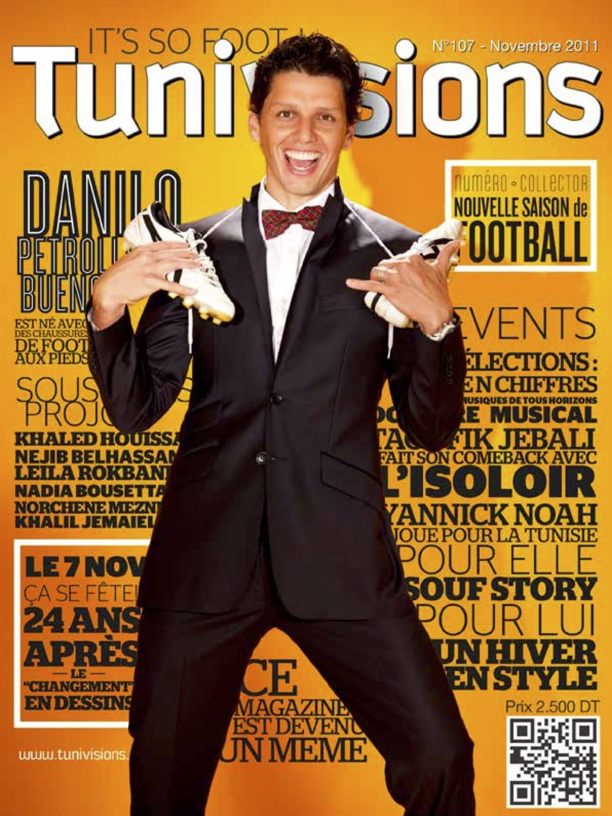 Couverture du numéro 107 du magazine tunisien Tunivisions.